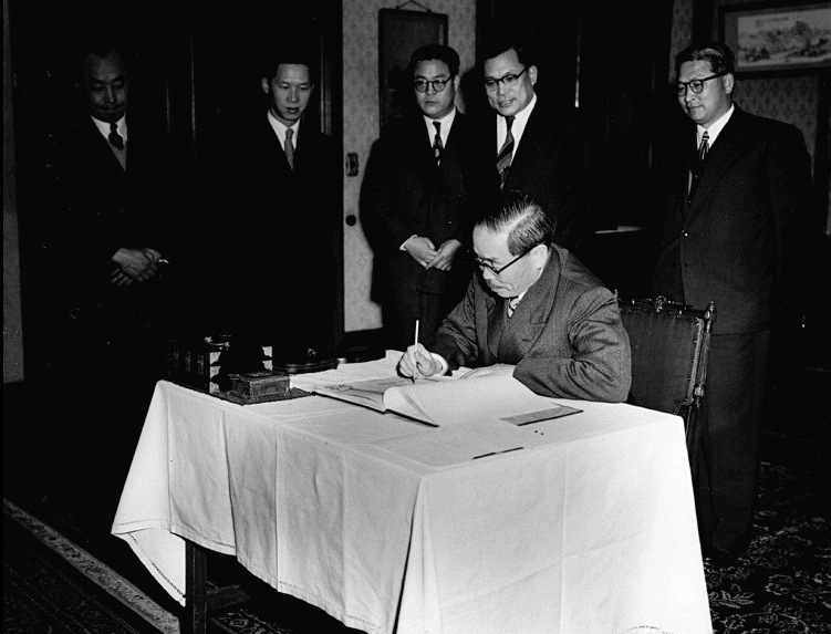 촬영일 : 1954년 01월 29일 촬영장소 : 대한민국 참석자 : 미상 인물상세정보 : 변영태 외무장관(우2) 관련내용 : 변영태 외무장관이 한·미 상호방위조약 비준서에 서명하고 있다.